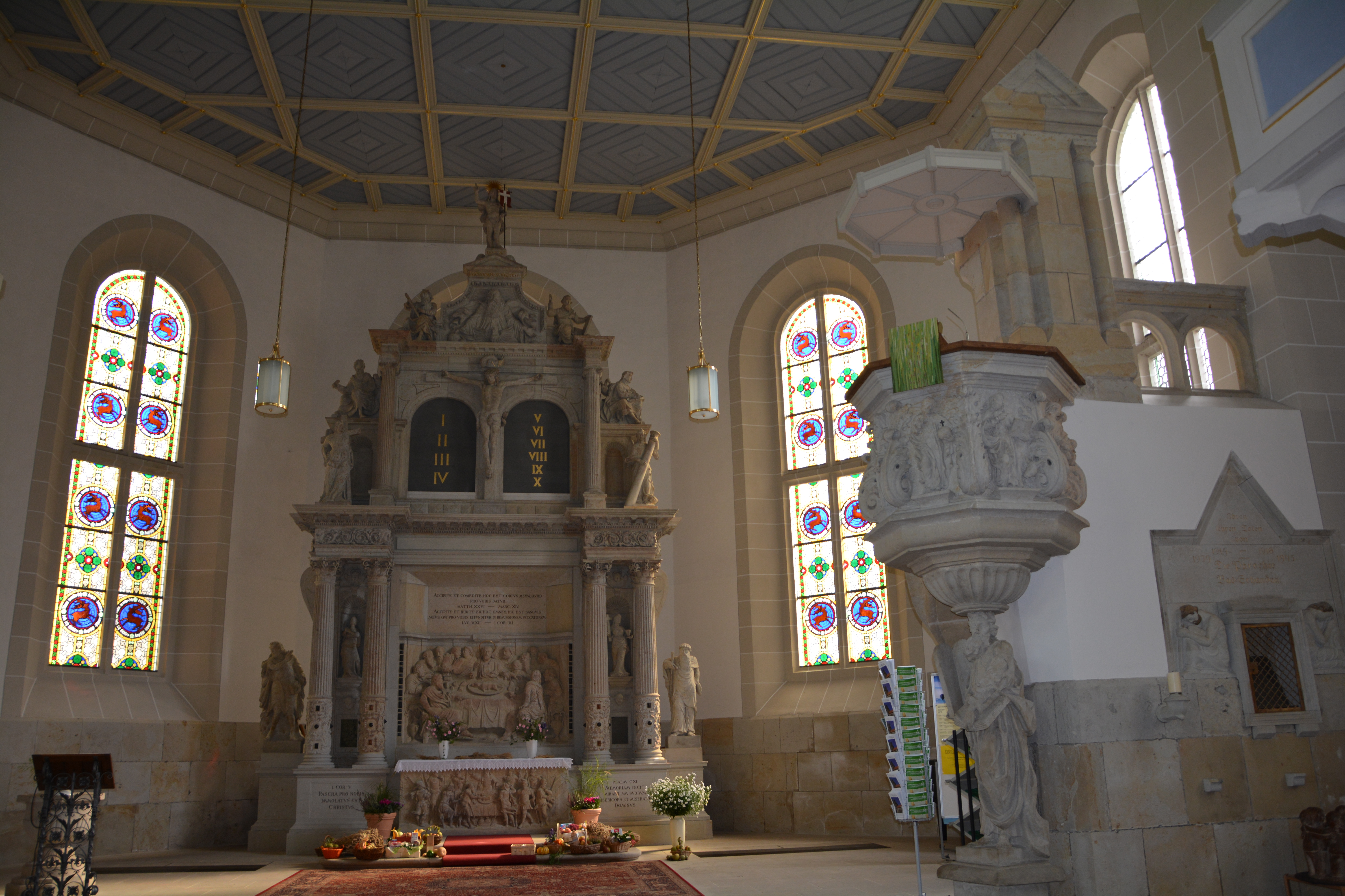 Denkmalgeschützte St.-Johannis-Kirche in Bad Schandau, Chorraum mit Altar und Kanzel. Der Altar wurde vom Bildhauer Hans Walther II geschaffen und stand bis 1760 in der Dresdner Kreuzkirche.